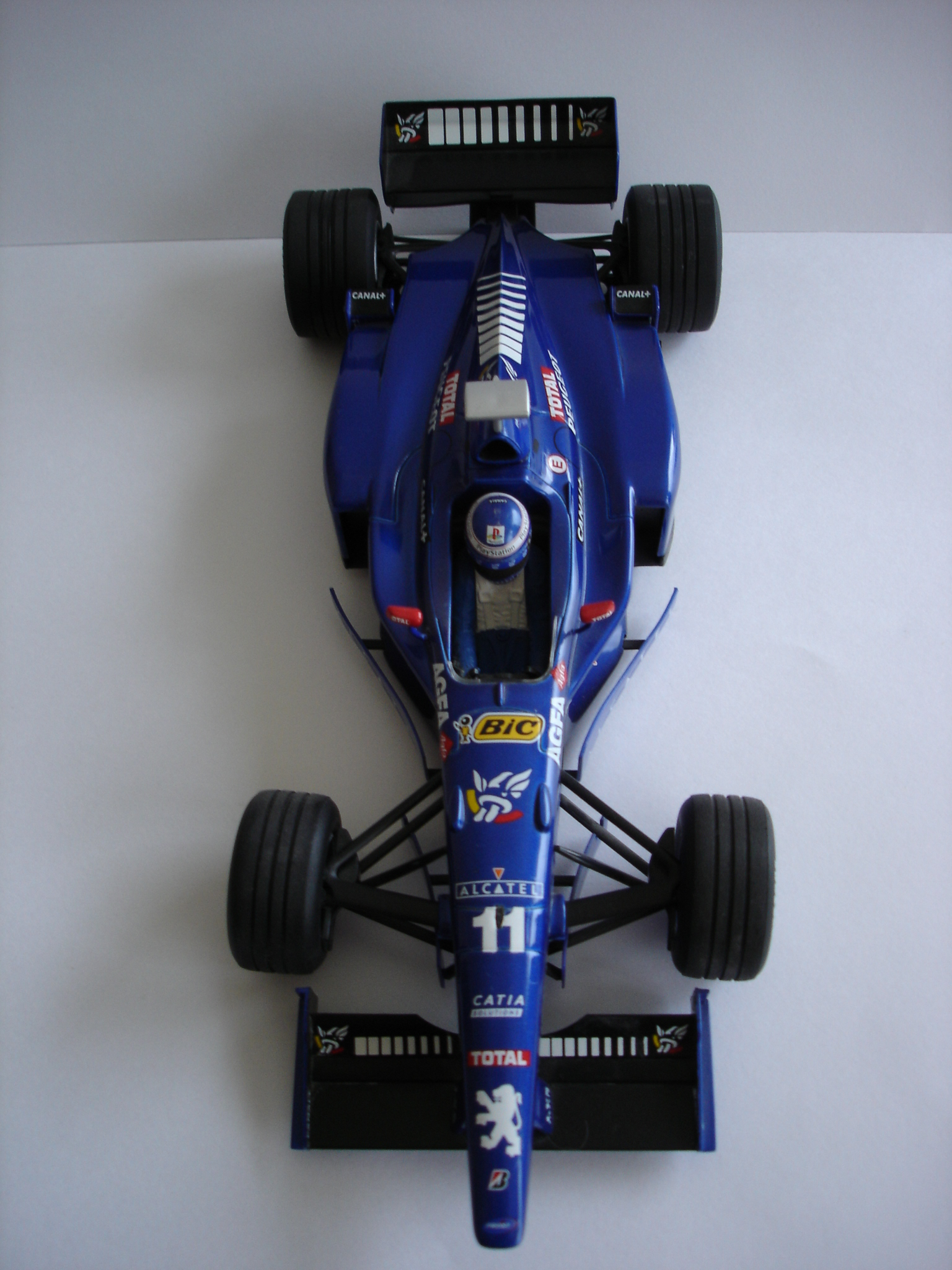 Prost AP01 model car